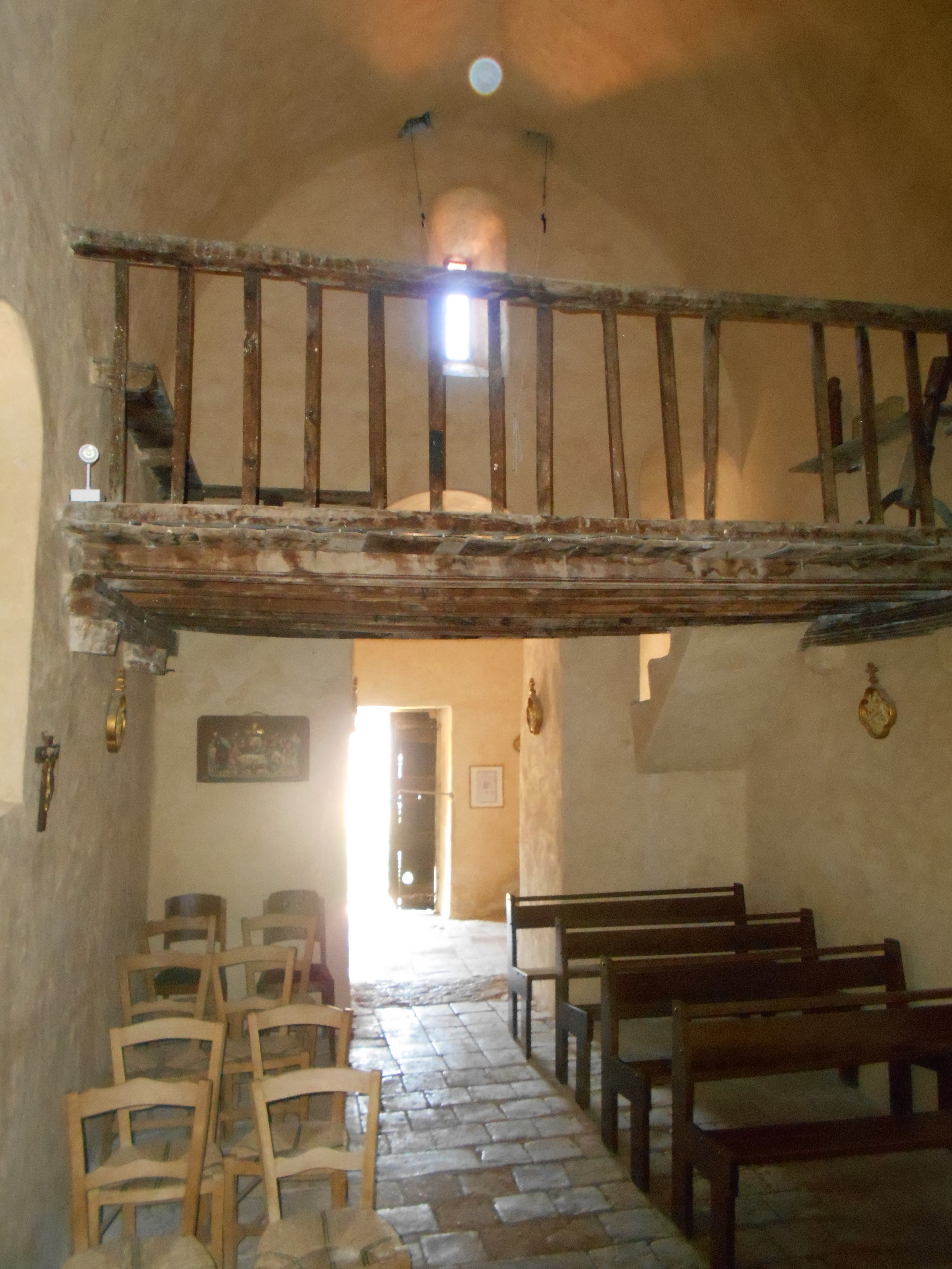 Interior de la Mare de Déu de la Roure